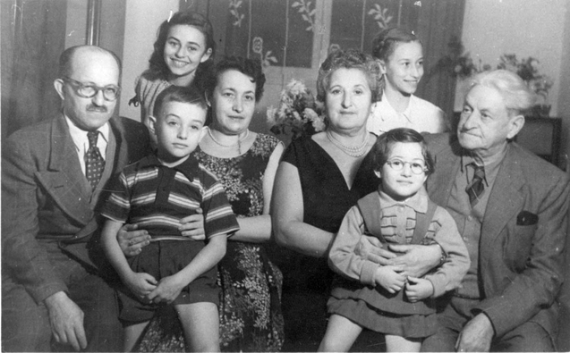 פנחס צ'רניאק עם משפחתו ומשה סתוי